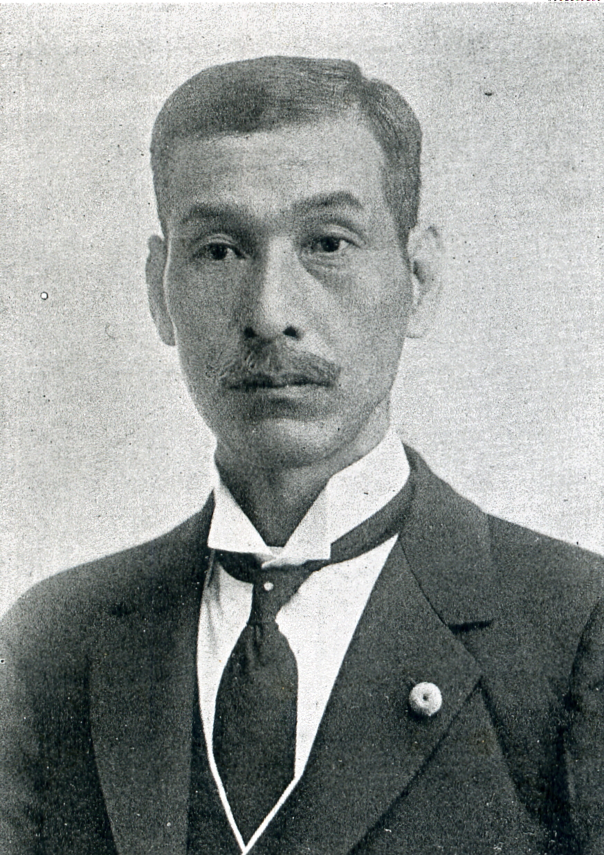 この写真は、志波安一郎（1873-1932）の写真です。